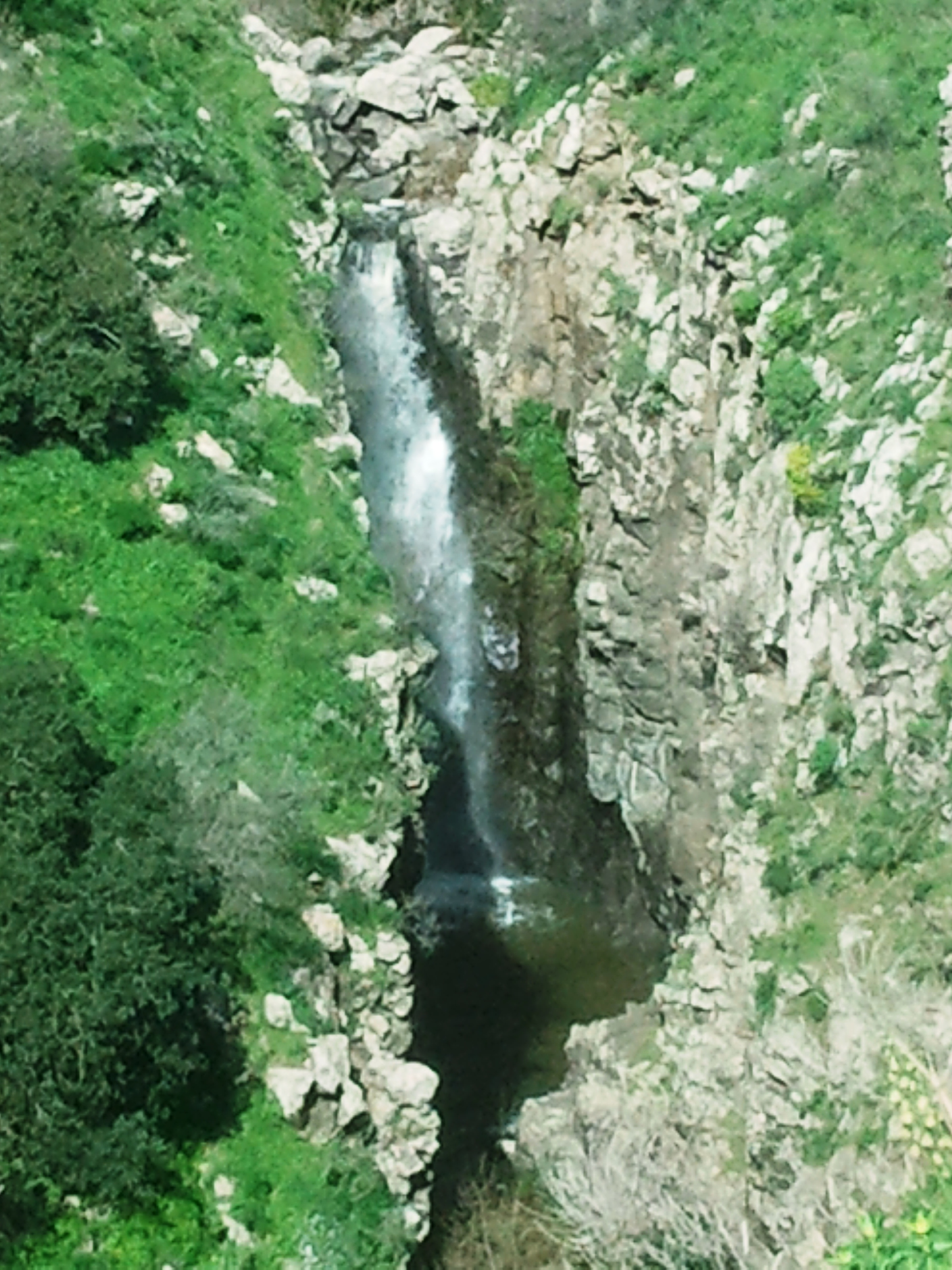 מפל בזלת בנחל בזלת יובל של נחל דליות בשמורת הגמלא ברמת הגולן